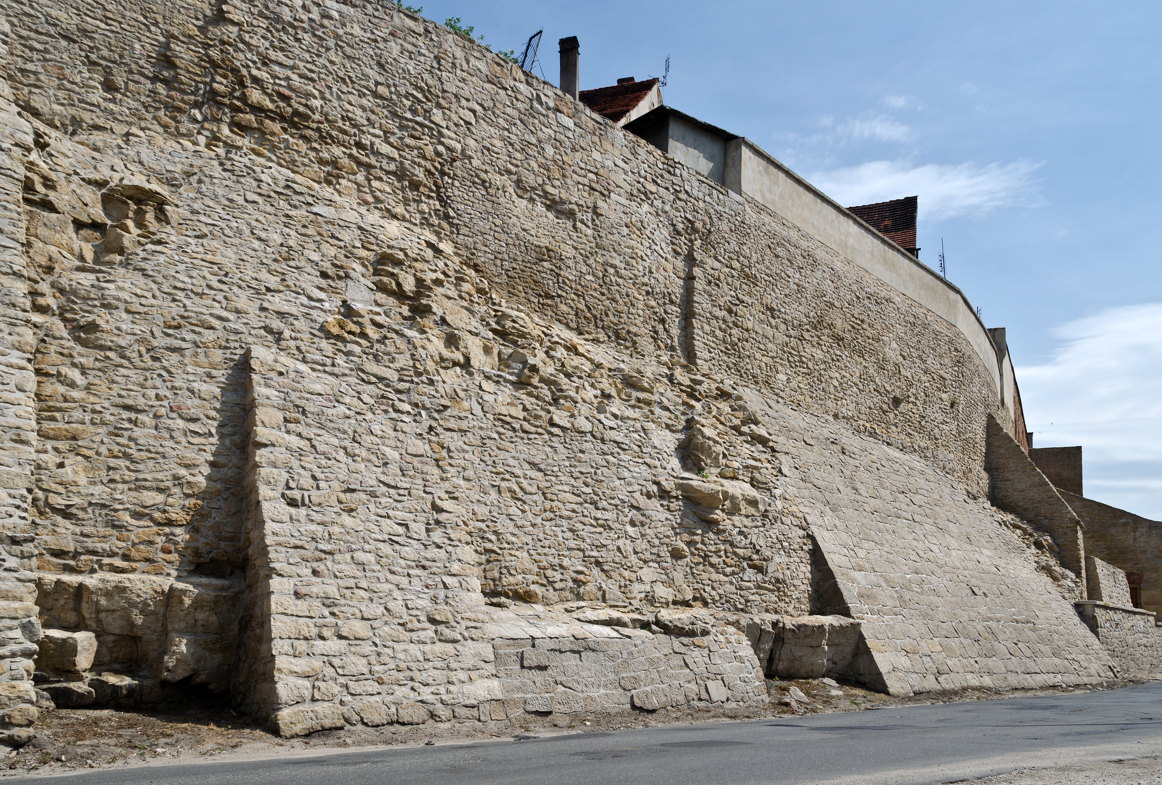 Bystrzyca Kłodzka, mury obronne